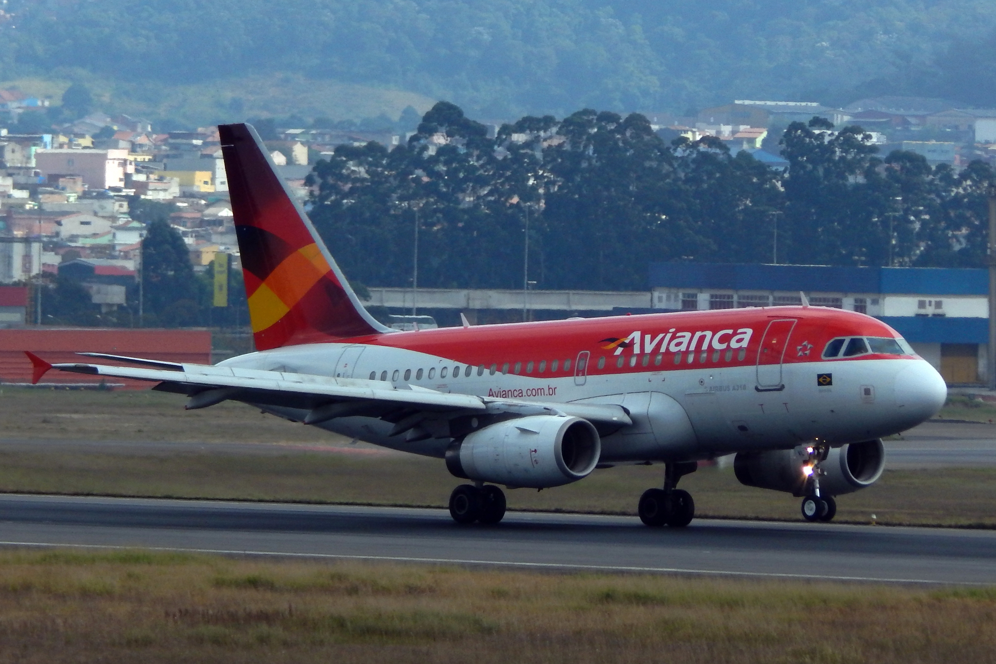 Airbus A318 landing on GRU Airport